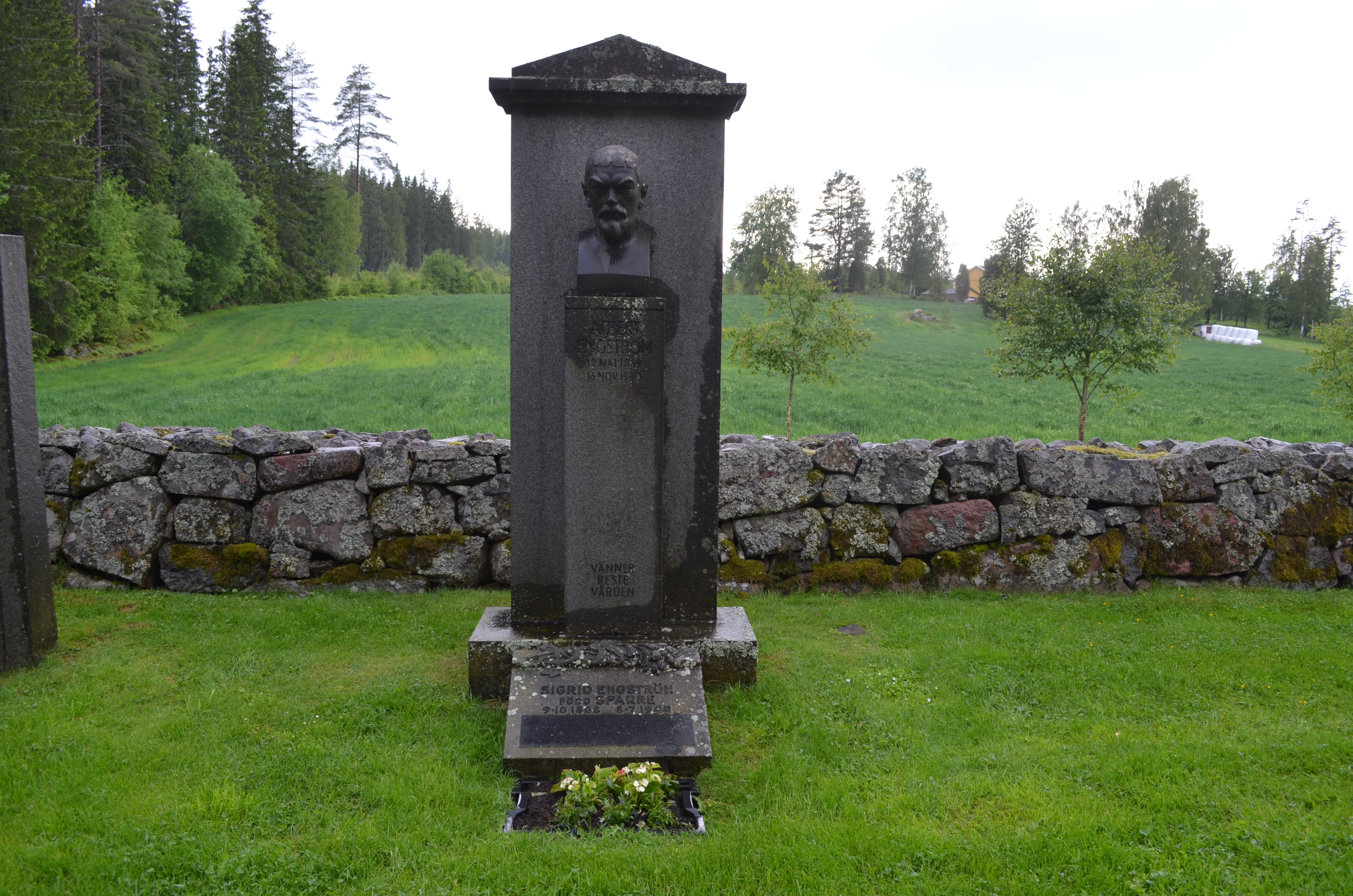 Konstnären och författaren Albert Engströms grav på Hults kyrkogård vid Hults kyrka i Småland. Porträttskulpturen av Albert Engström (1869-1940) är utförd 1943 av skulptören Carl Fagerberg (1878-1948).